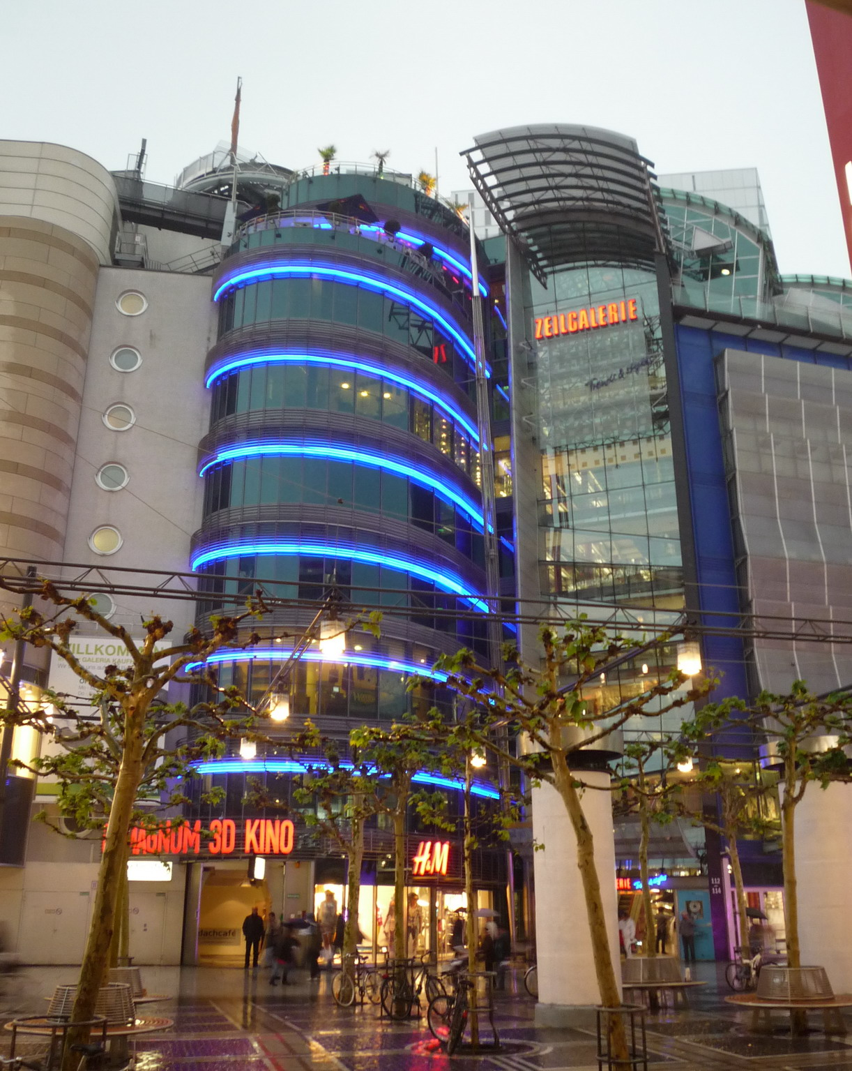 Frankfurt, Zeilgalerie bei Ragen